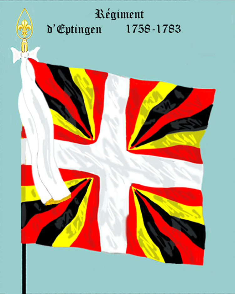 Ordonnanzfahne eines Fremdenregiments im königlich französischen Dienst. (Schweizer Regiment) - Entnommen und überarbeitet aus: „LES UNIFORMES ET LES DRAPEAUX DE L'ARMÉE DU ROI“ Marseille 1899. - Drapeau d'Ordonnance d' un régiment étranger au service française (régiment suisse.)